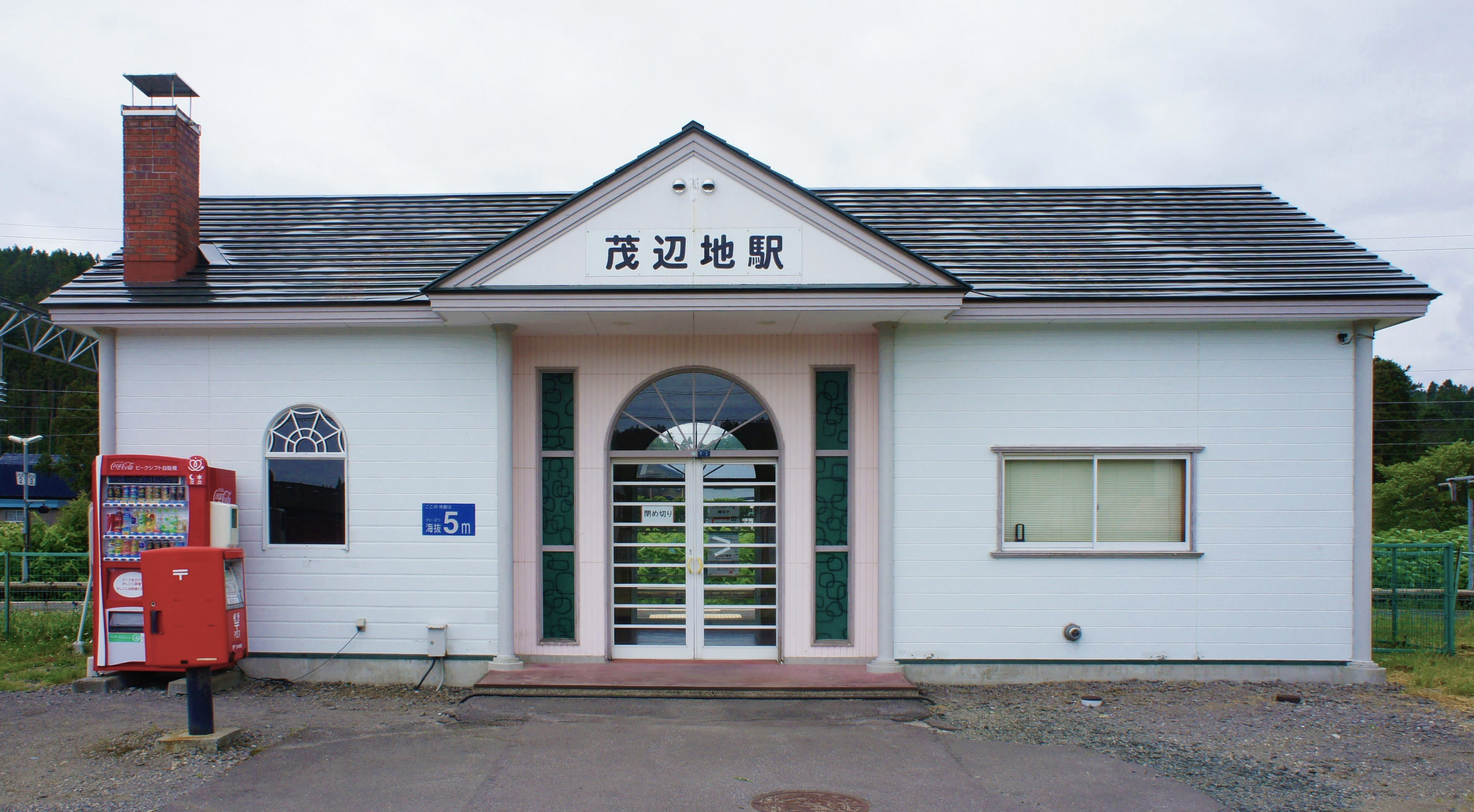 道南いさりび鉄道線・茂辺地駅の駅舎